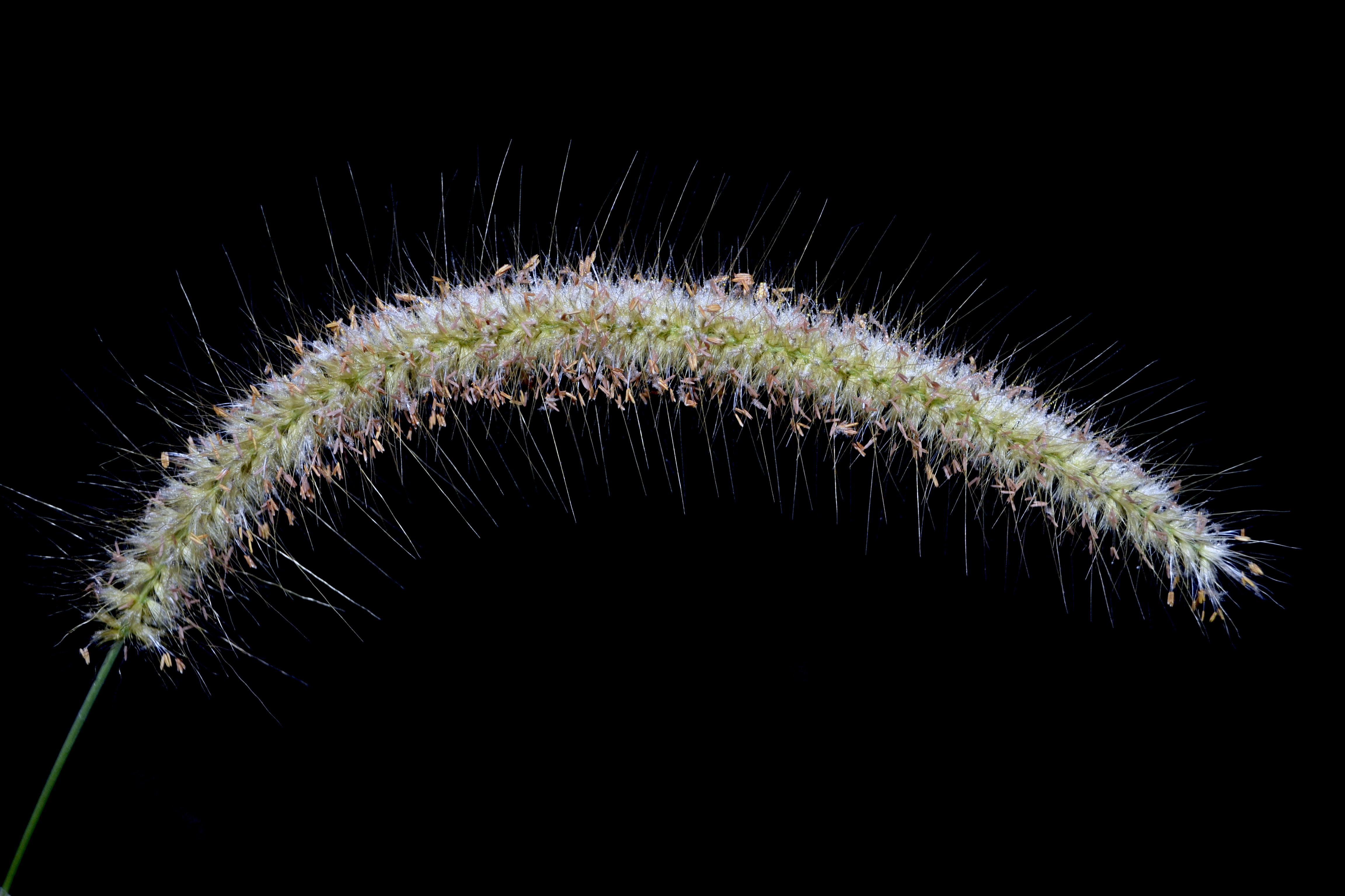 Ripening seeds of Pennisetum setaceum